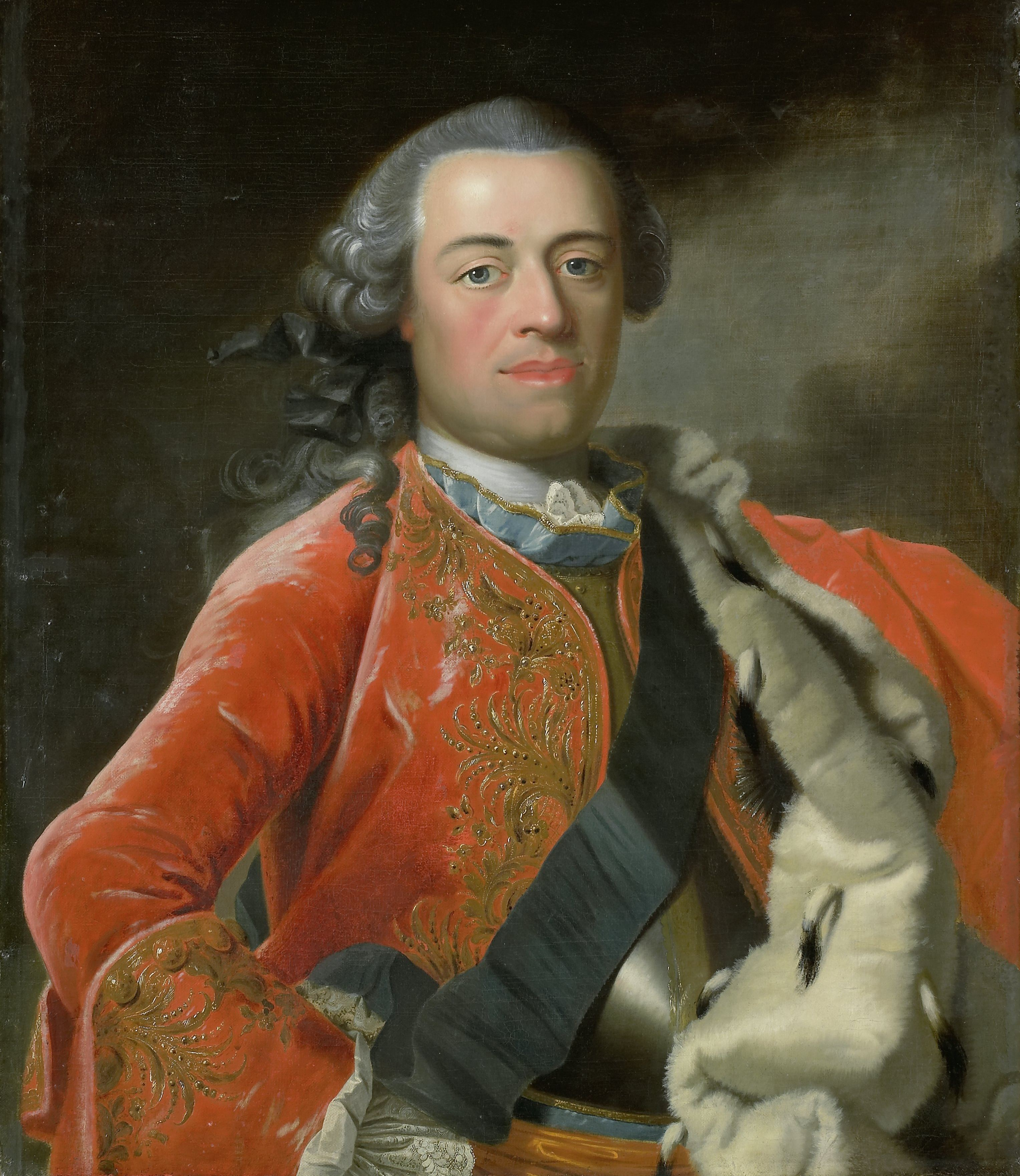 Portret van stadhouder Willem IV (overleden 1751), bij zijn leven vervaardigd.